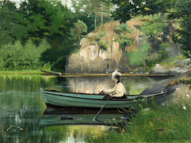 Картины художницы Asta Nørregaard (1853-1933)